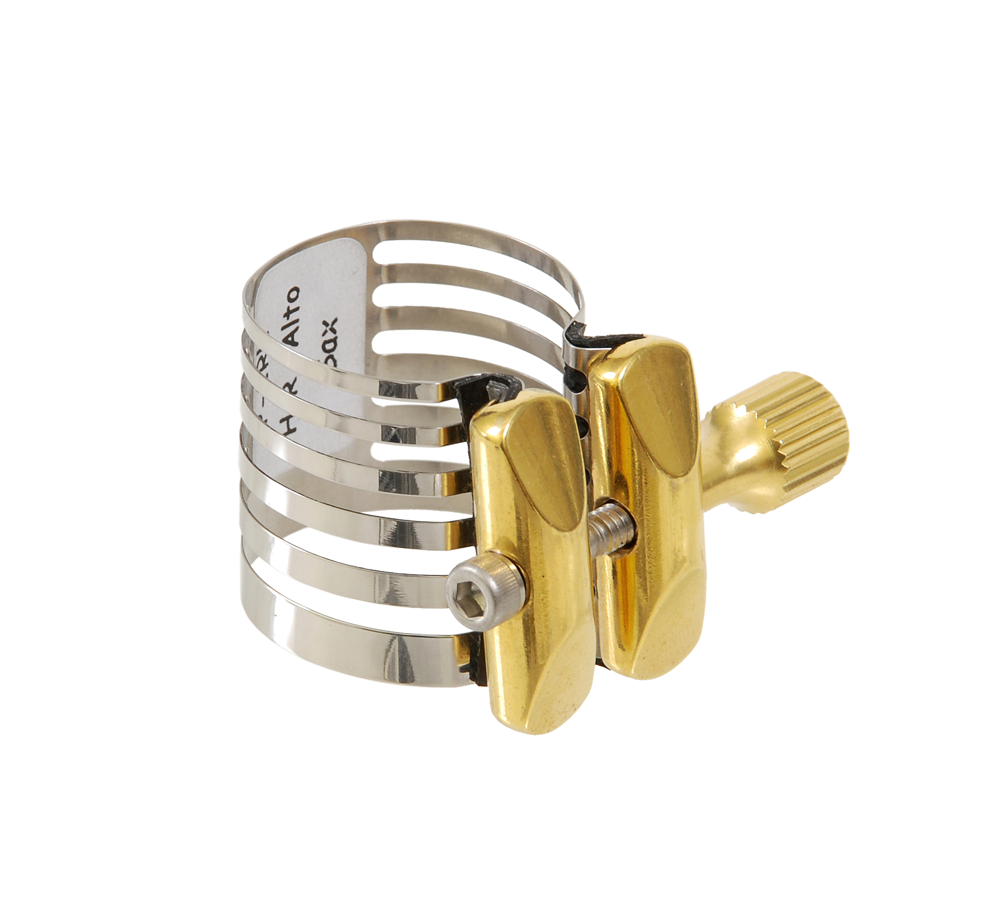 Ligaturka do saksofonu altowego P-1RL Platinum firmy Rovner